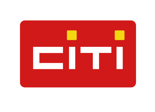 Логотип телеканалу "СІТІ"